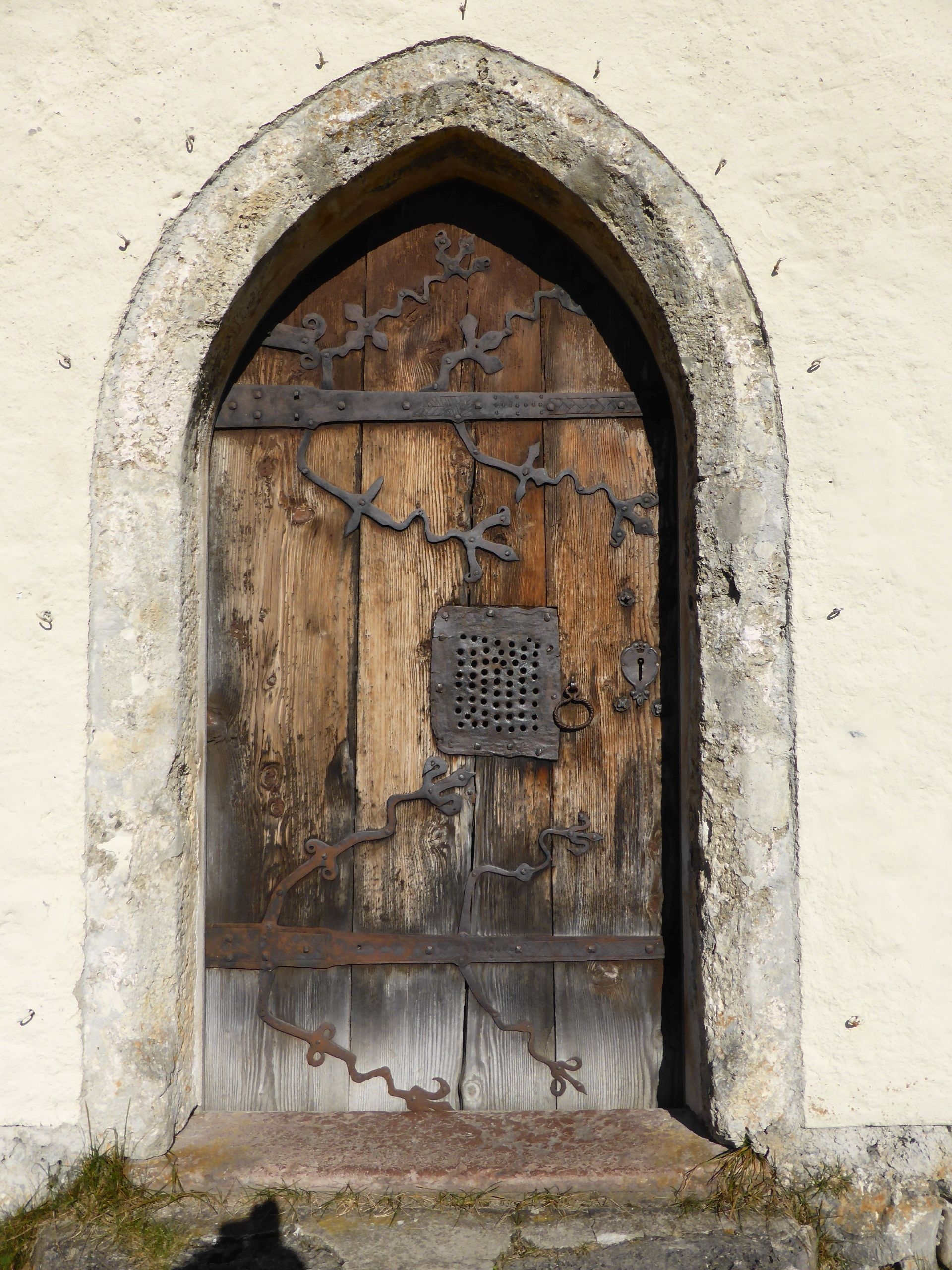 Kath. Filialkirche hll. Primus und Felizian in Buchberg